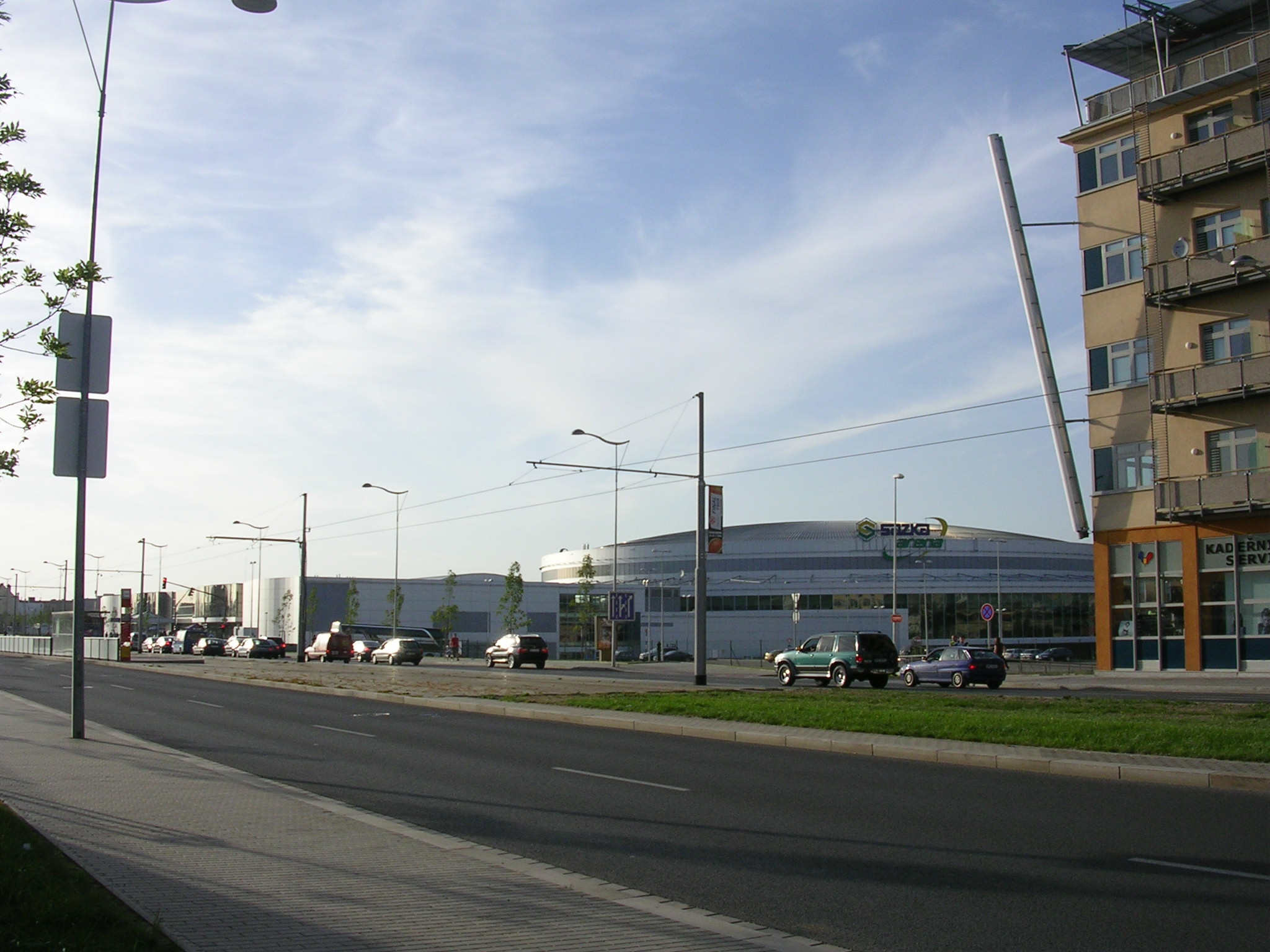 Sazka arena, Praha-Vysočany